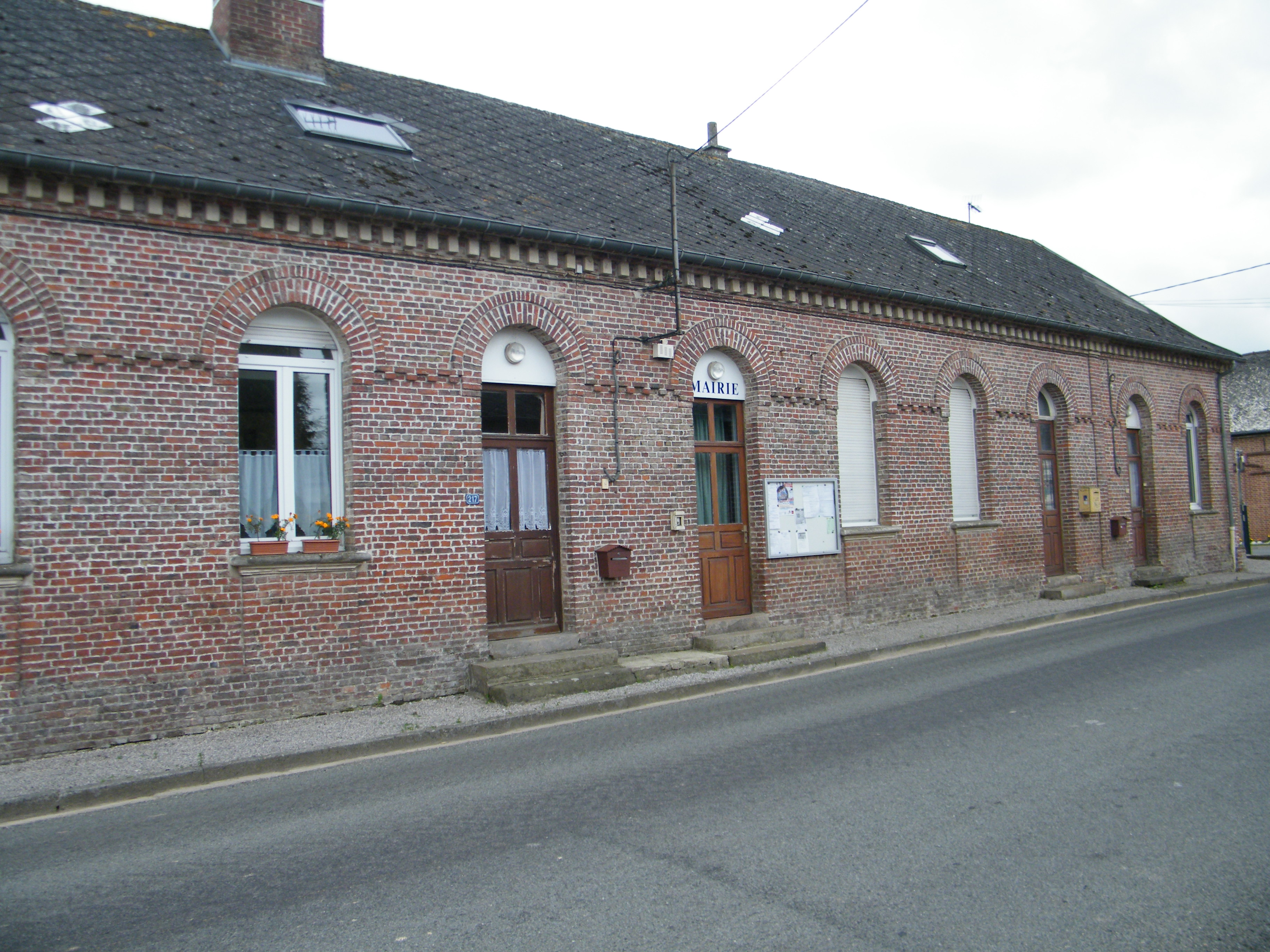 Mairie.